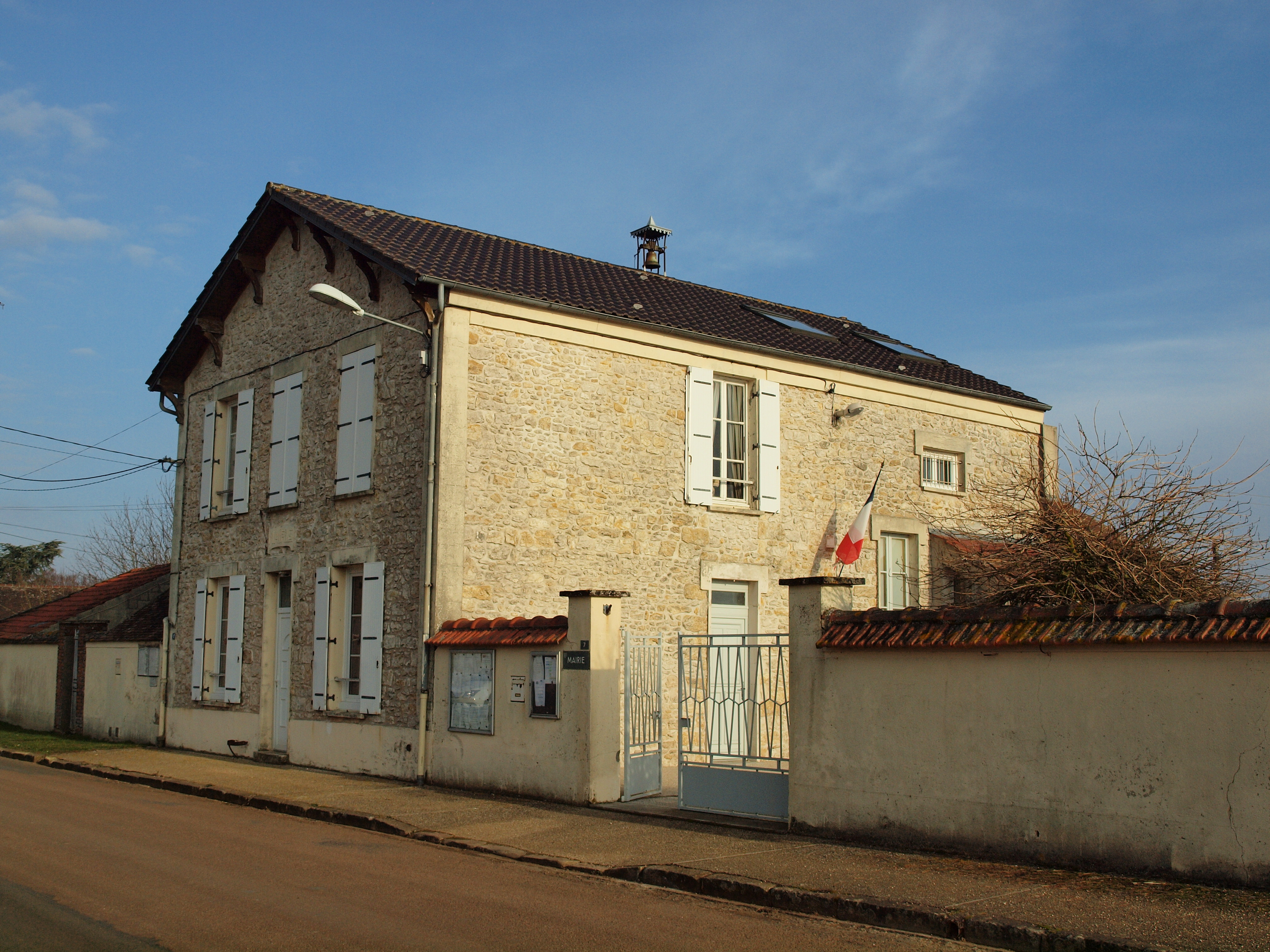 Mairie de Garentreville (Seine-et-Marne, France)